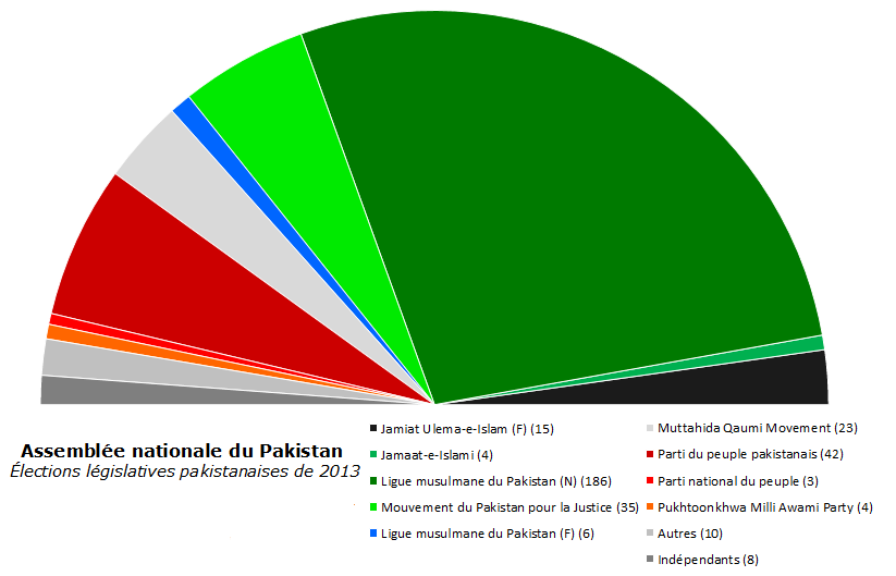 Composition de l'Assemblée nationale du Pakistan après les élections de 2013